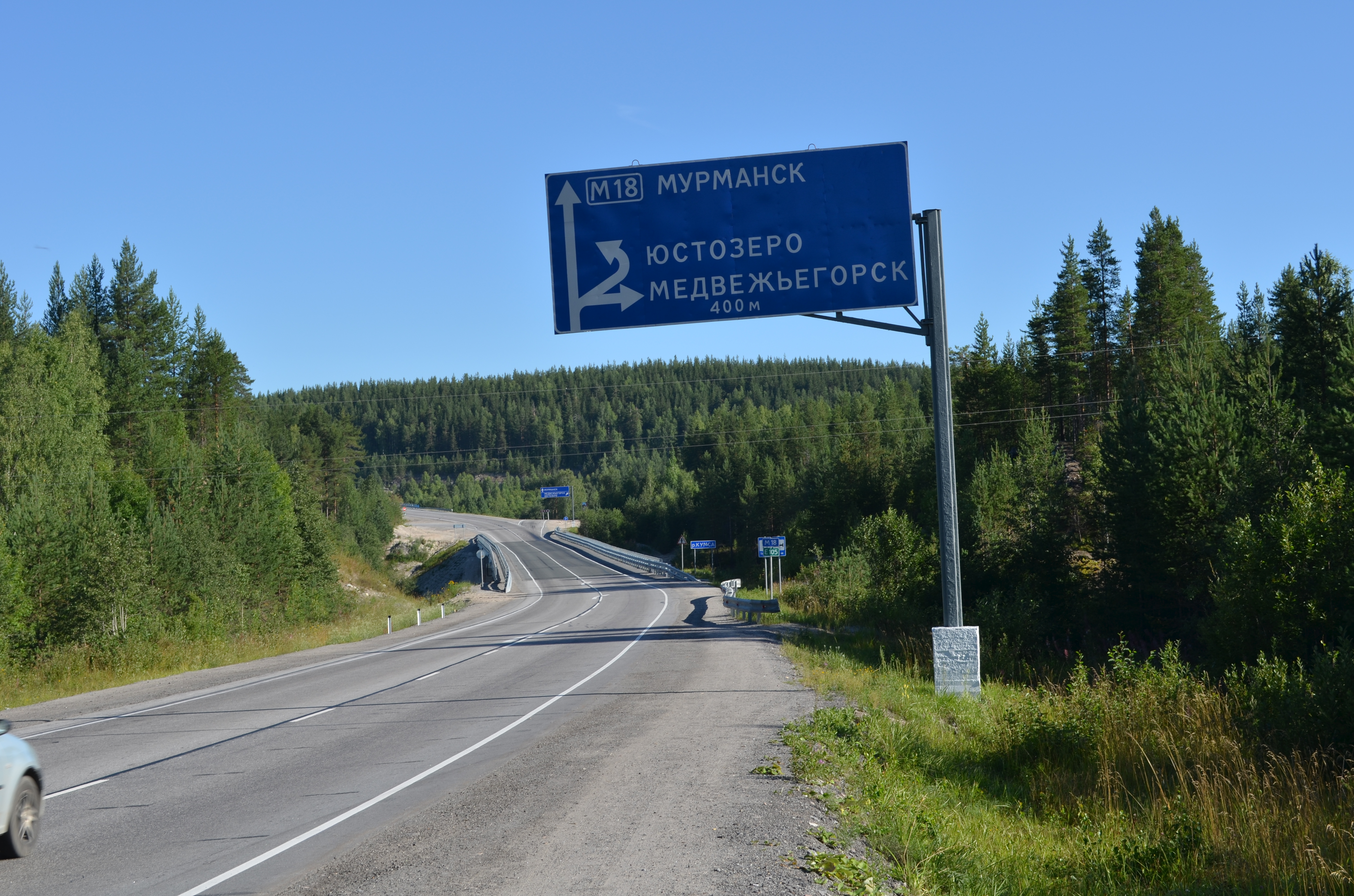 Поблизу Мєдвєж'єгорська